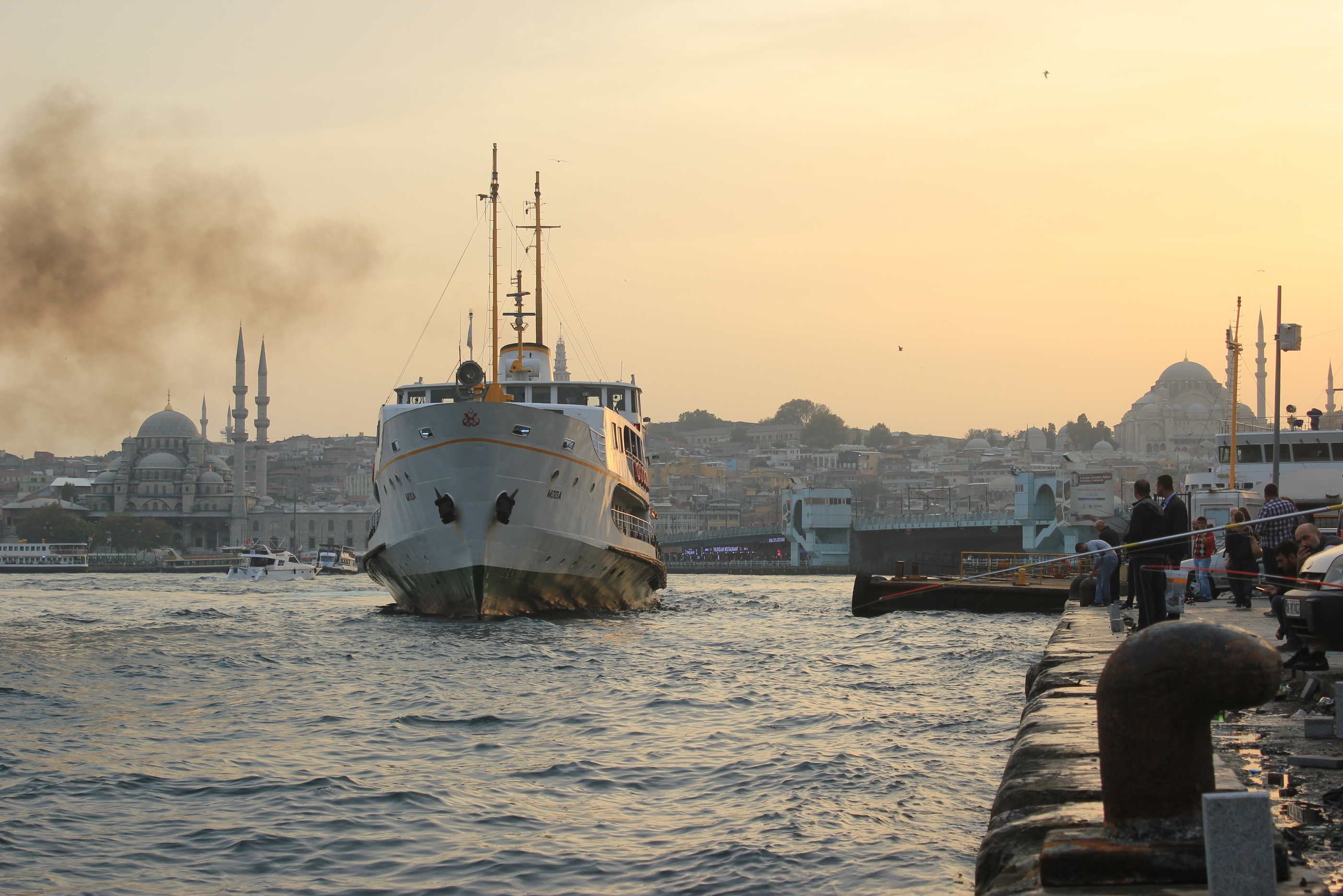 Bosporusfähre vor dem Anleger von Karaköy in Istanbul.